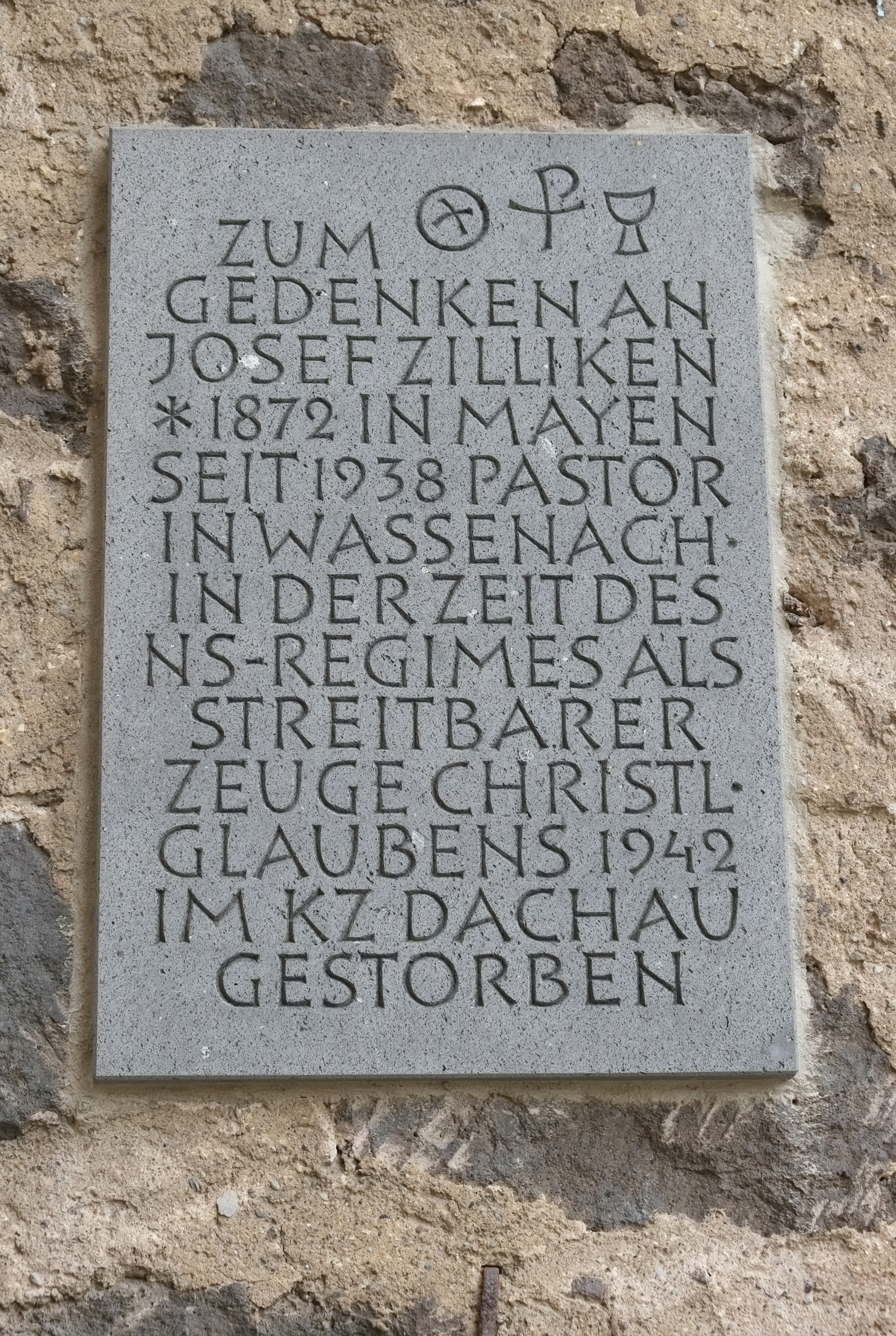 Gedenktafel für Josef Zilliken in der Kirche St. Remigius in Wassenach im Landkreis Ahrweiler (Rheinland-Pfalz)